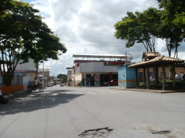 Vista da Praça São Sebastião, em Santa Cruz de Minas, Minas Gerais, Brasil.